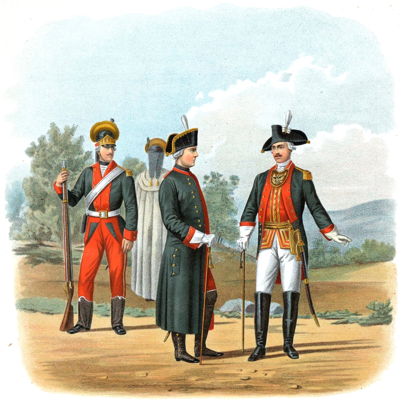 Московский гренадерский полк. 1790-1796. Гренадер в парадной форме, гренадер в шинели, штаб-офицер в сюртуке, штаб-офицер в парадной форме.